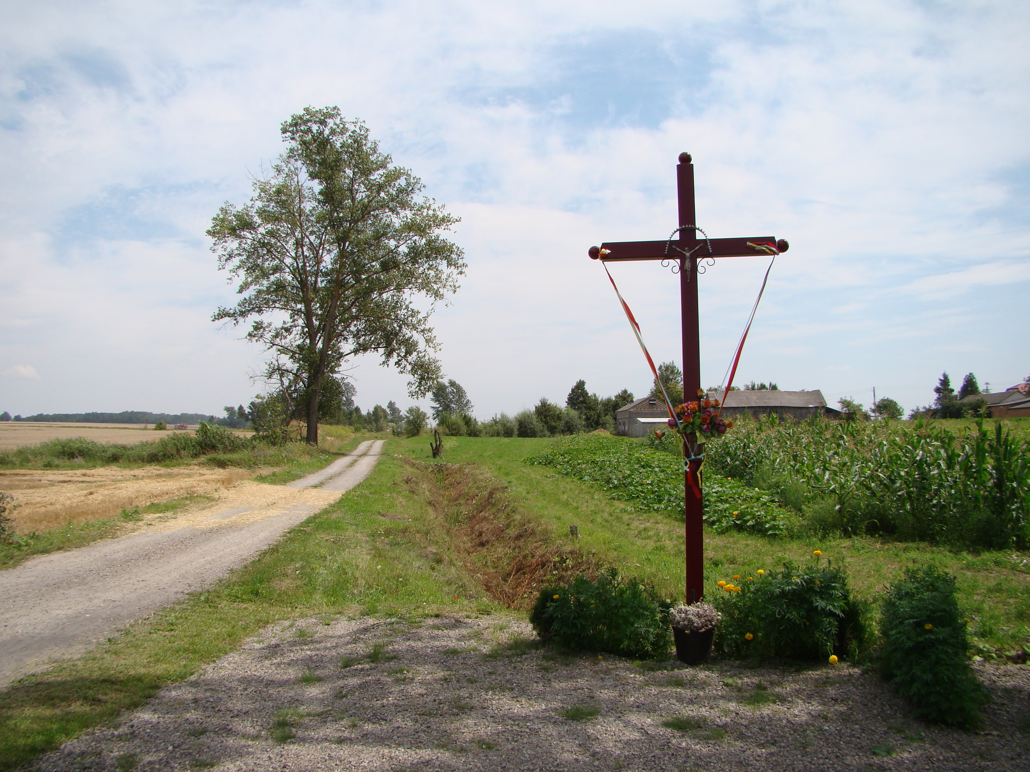 Kříž ve vesnici Adelina, Polsko